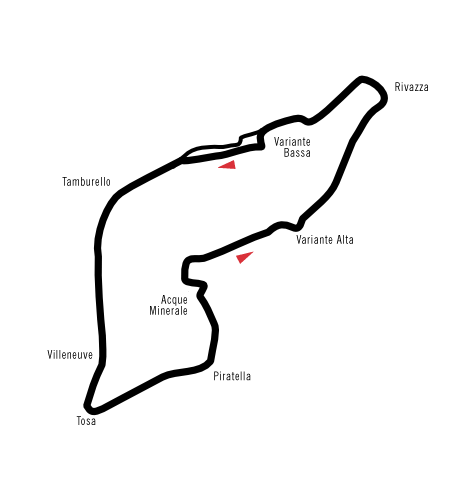 Autodromo Enzo e Dino Ferrari, Imola (1981-1994 Layout)